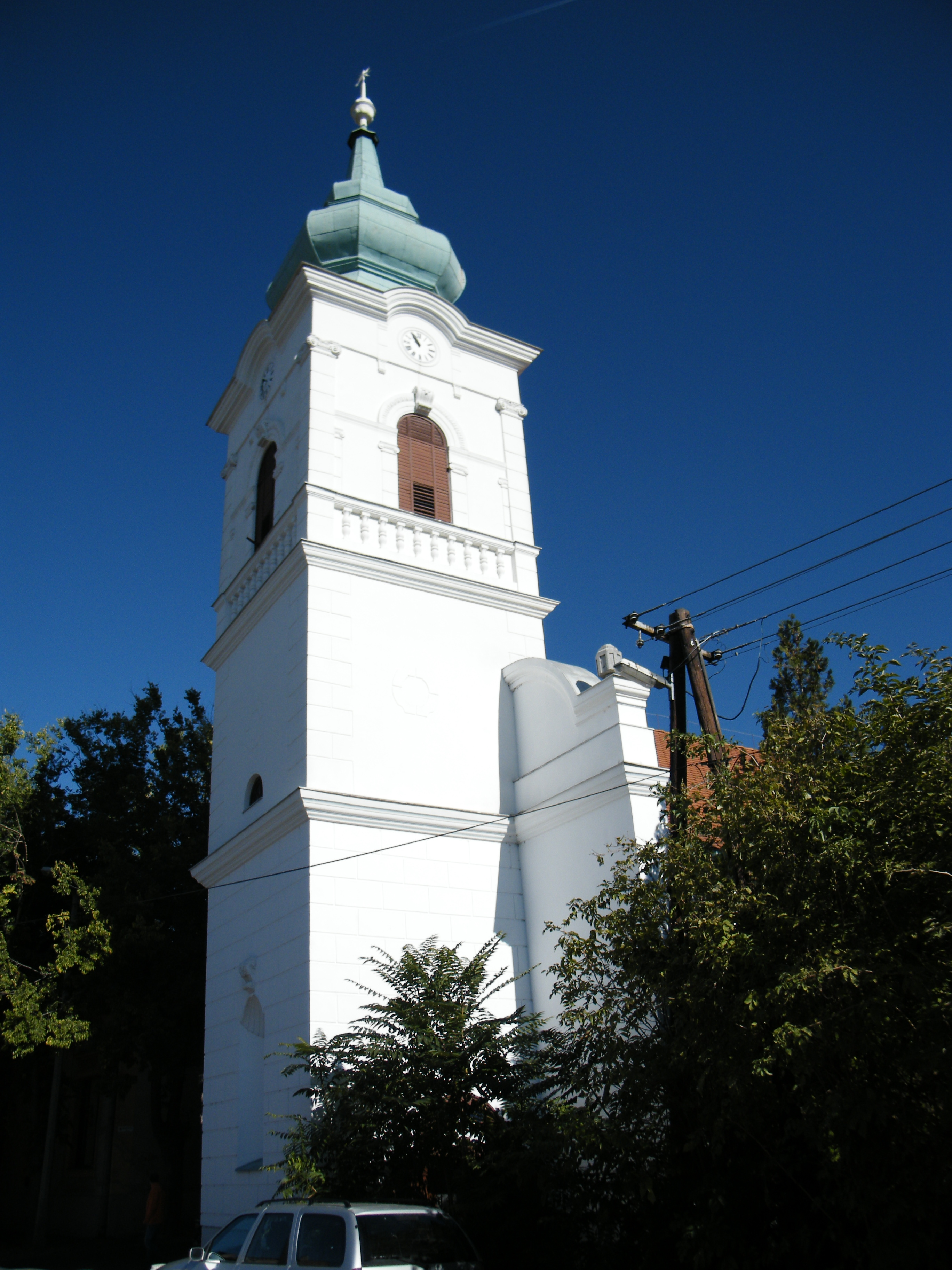 Református templom (Abony, Kálvin János utca 2.) This is a photo of a monument in Hungary. Identifier: 6863